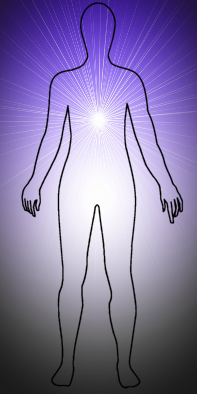 Събирателната точка (фокус на ежедневното съзнание) - крайъгълен камък във философията на Карлос Кастанеда / учението на Дон Хуан.